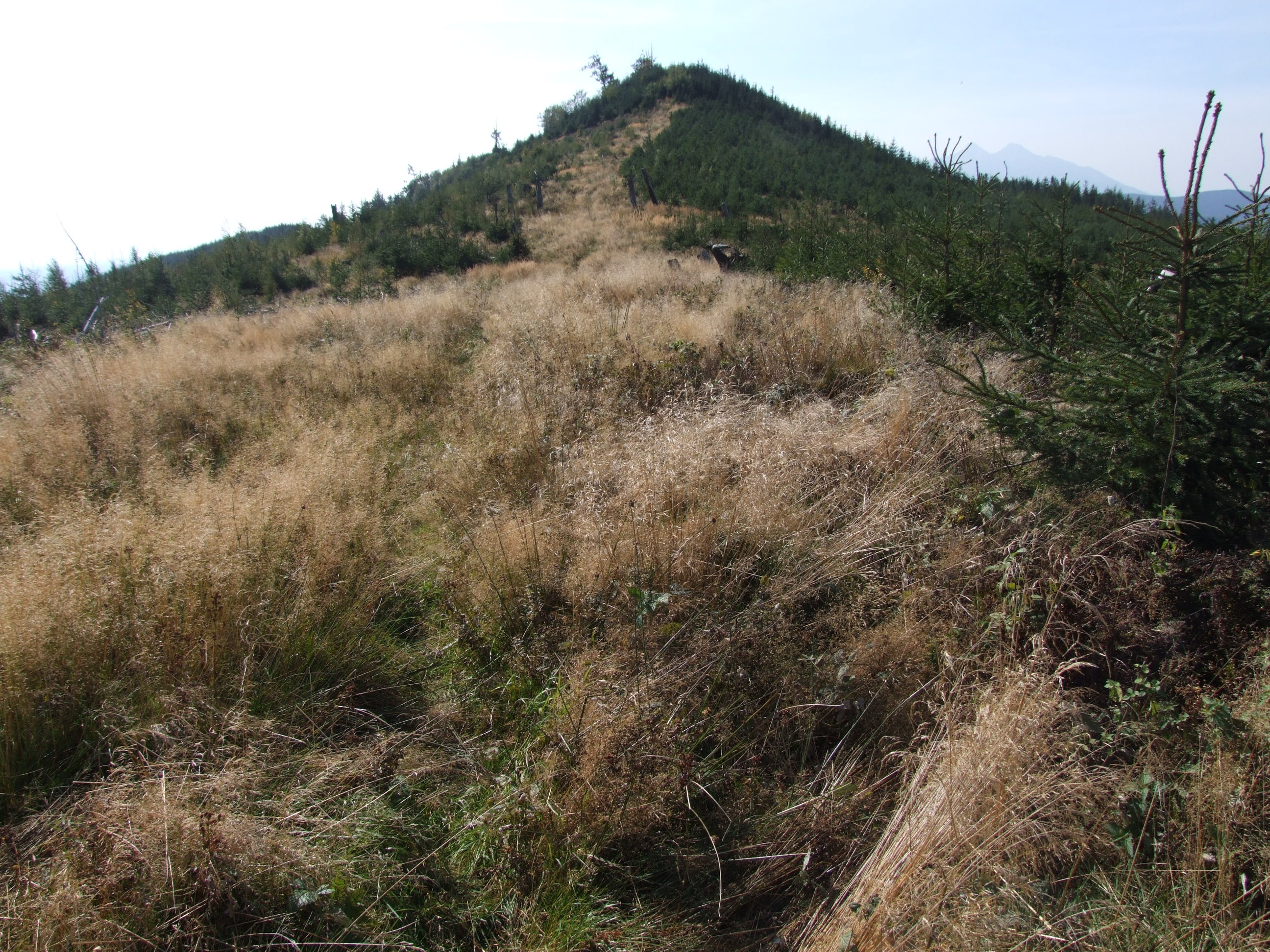 Spádik (Magura Spiska). Wierzchołek po wiatrołomach 2004 r.